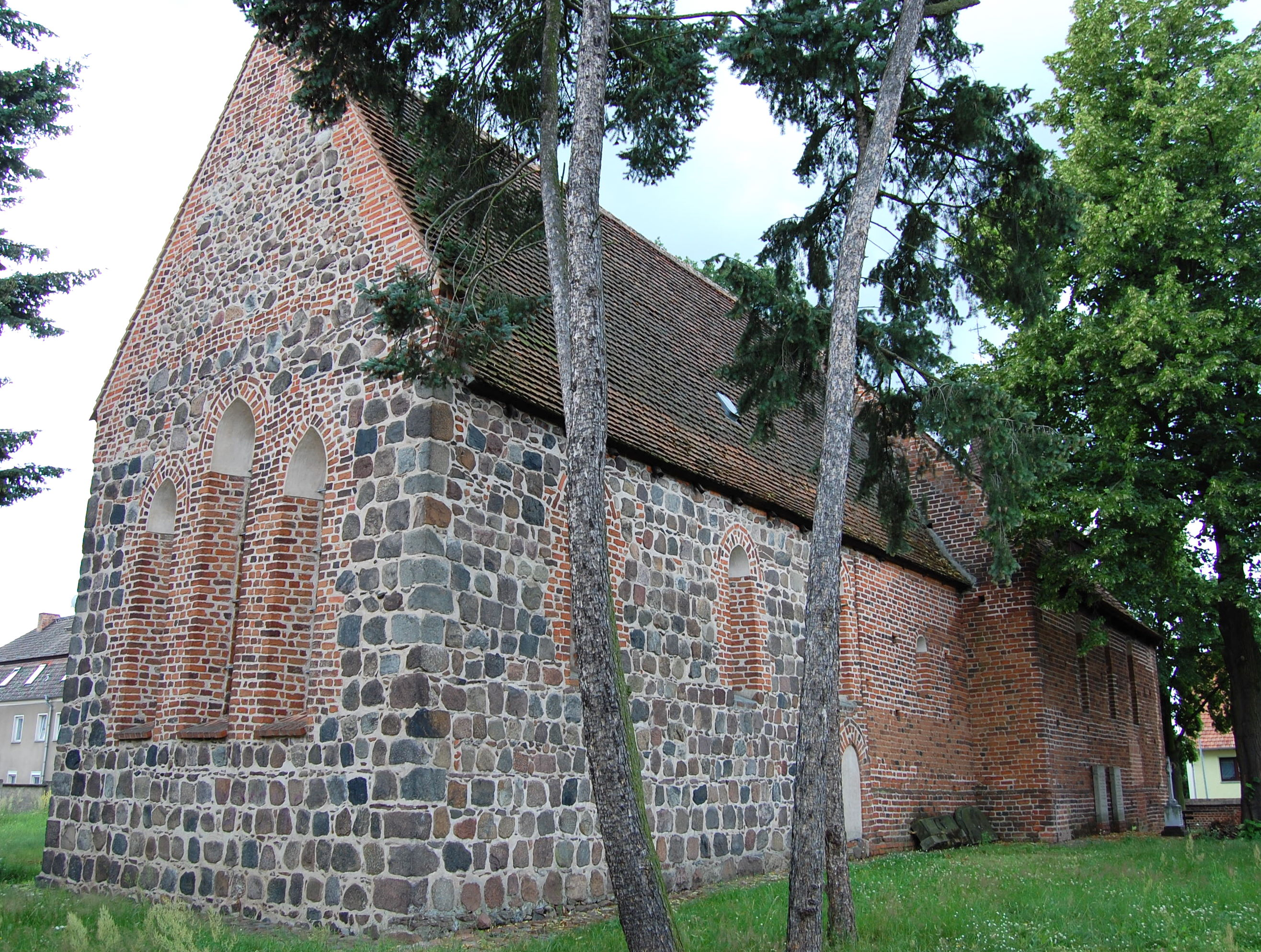 Dorfkirche Steinkirchen in Lübben, Blick von Nordost